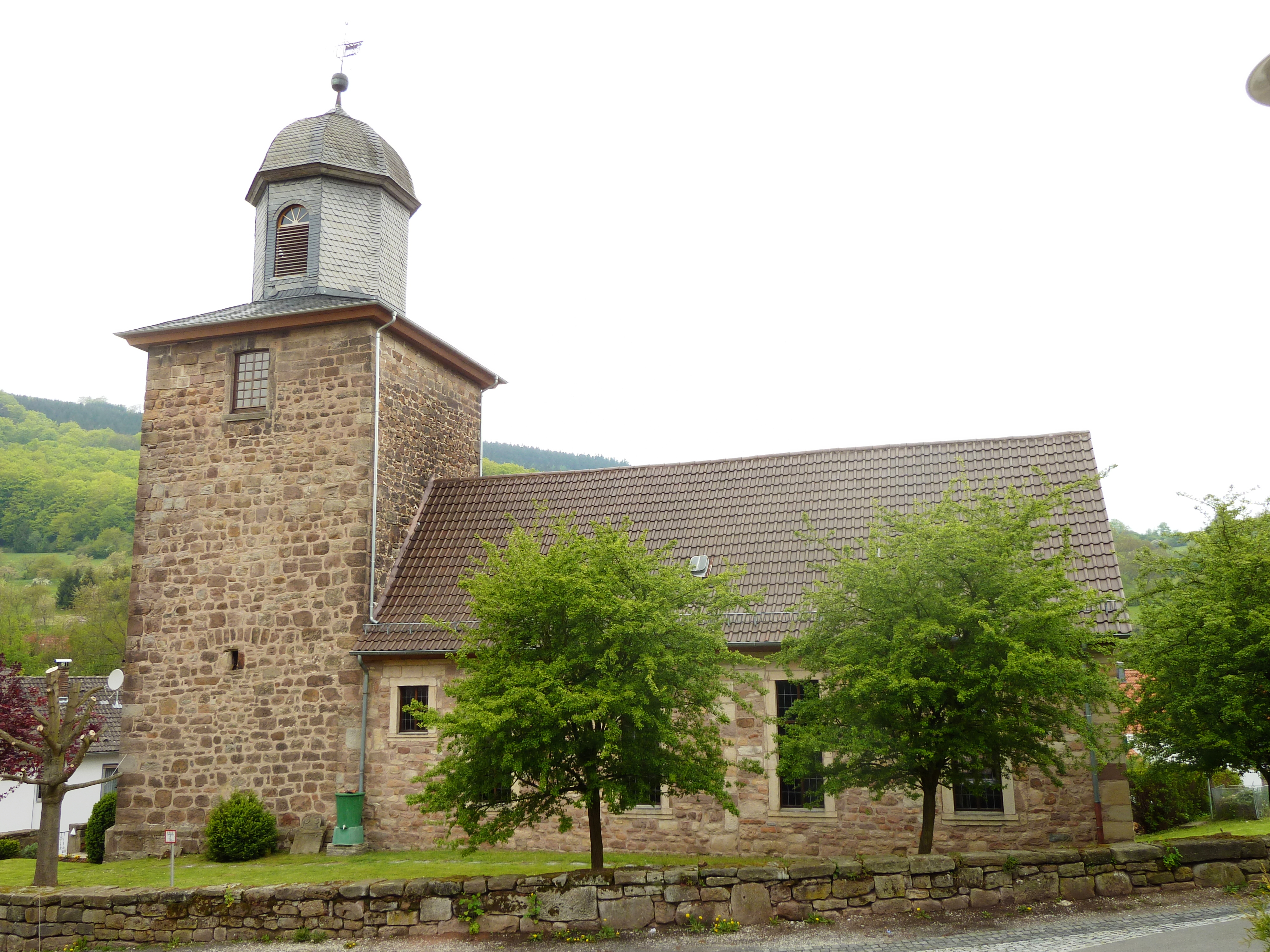 Ev. Kirche in Trubenhausen, Gemeinde Großalmerode, Nordhessen